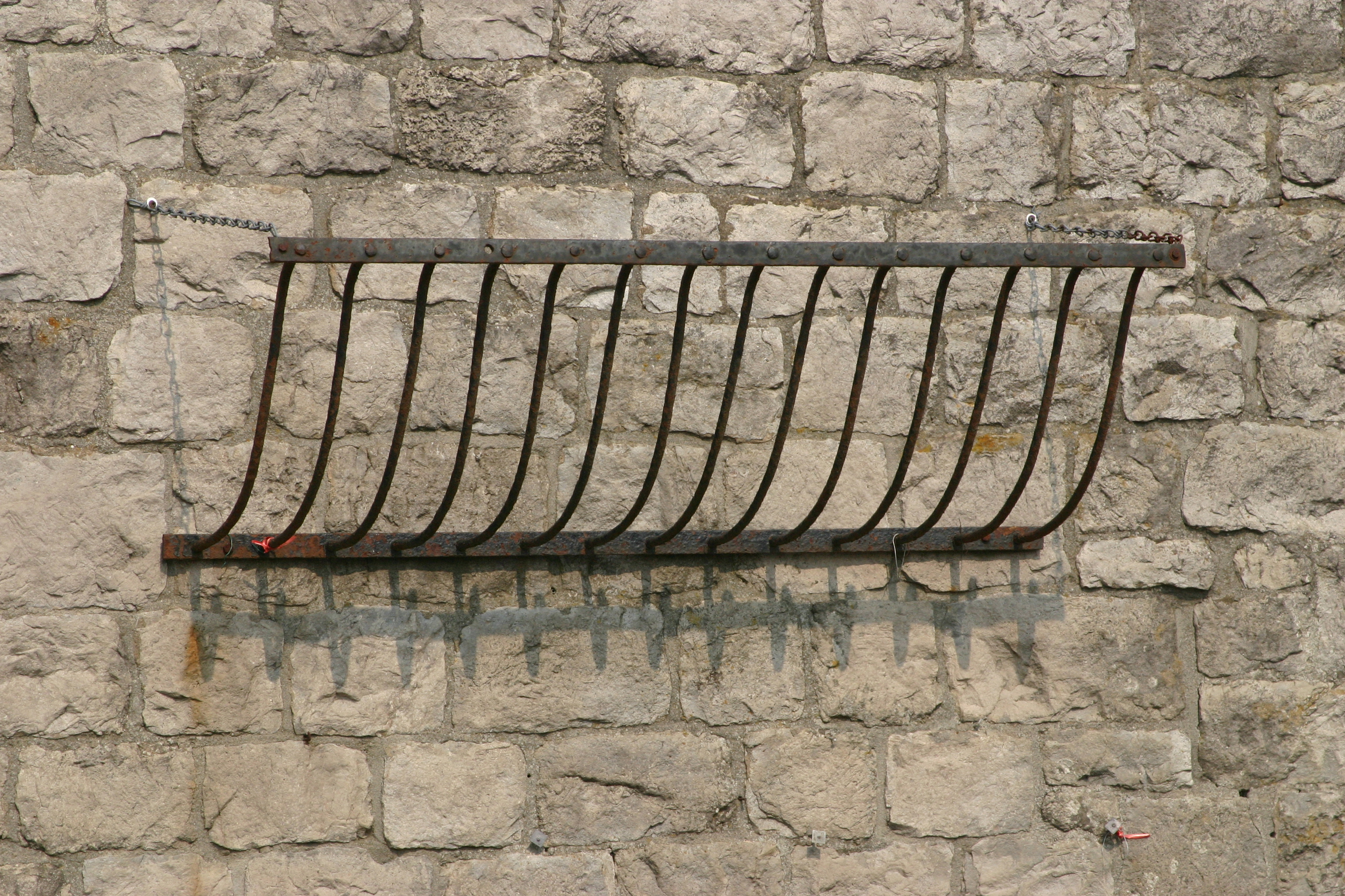 E Raf op engem Giewel zu Warzéé. Kategorie:Landwirtschaft